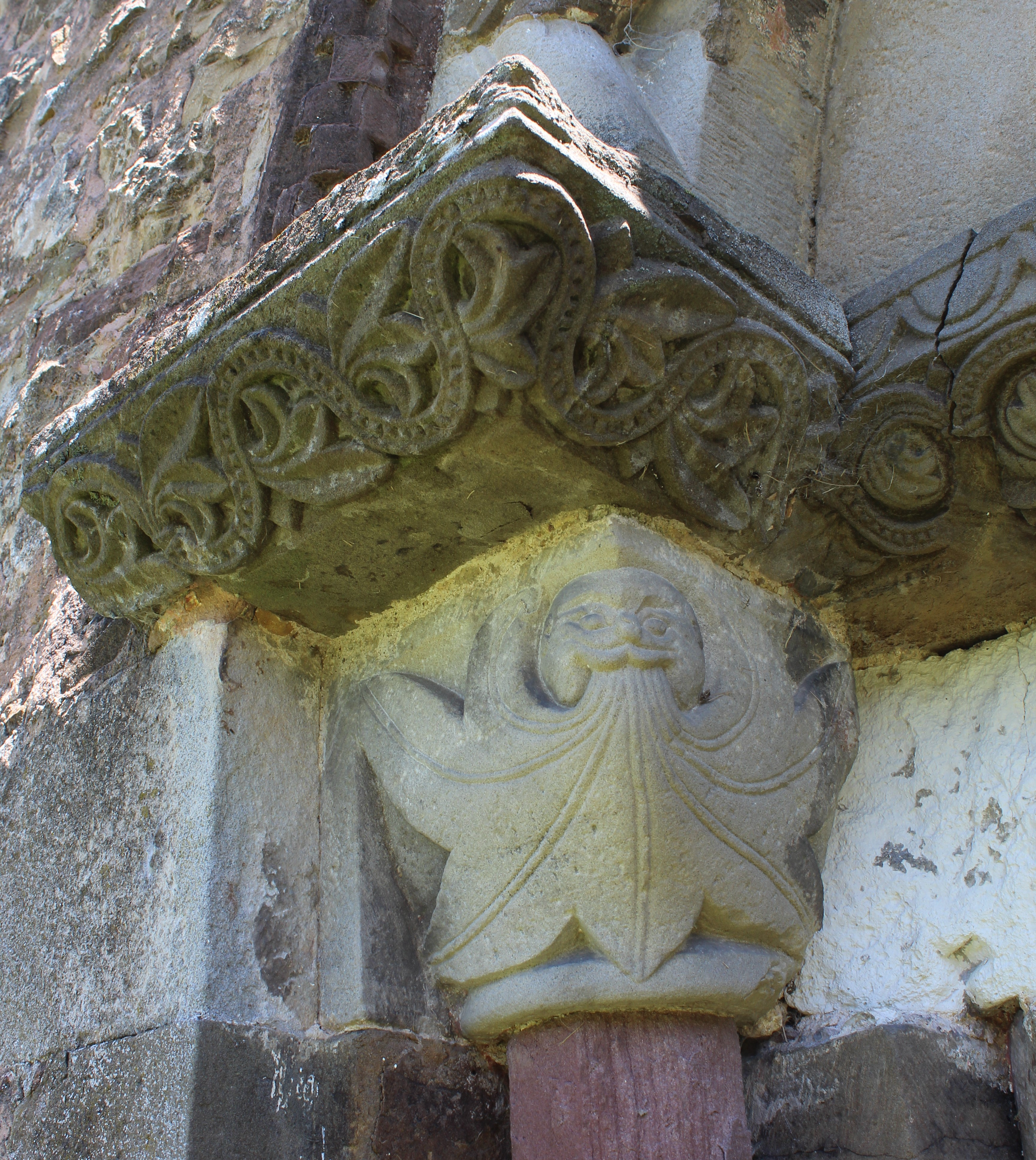 Capitel pórtico principal exterior, zona derecha